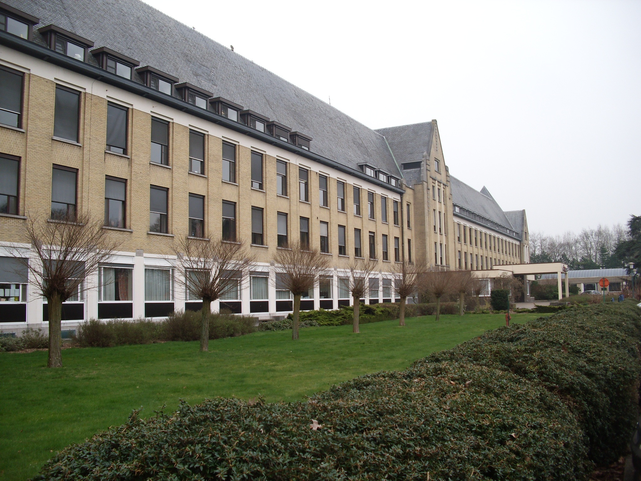 AZ Alma - Campus Sijsele - Gentse Steenweg 132 - Sijsele - Damme - West-Vlaanderen - Vlaams Gewest - België